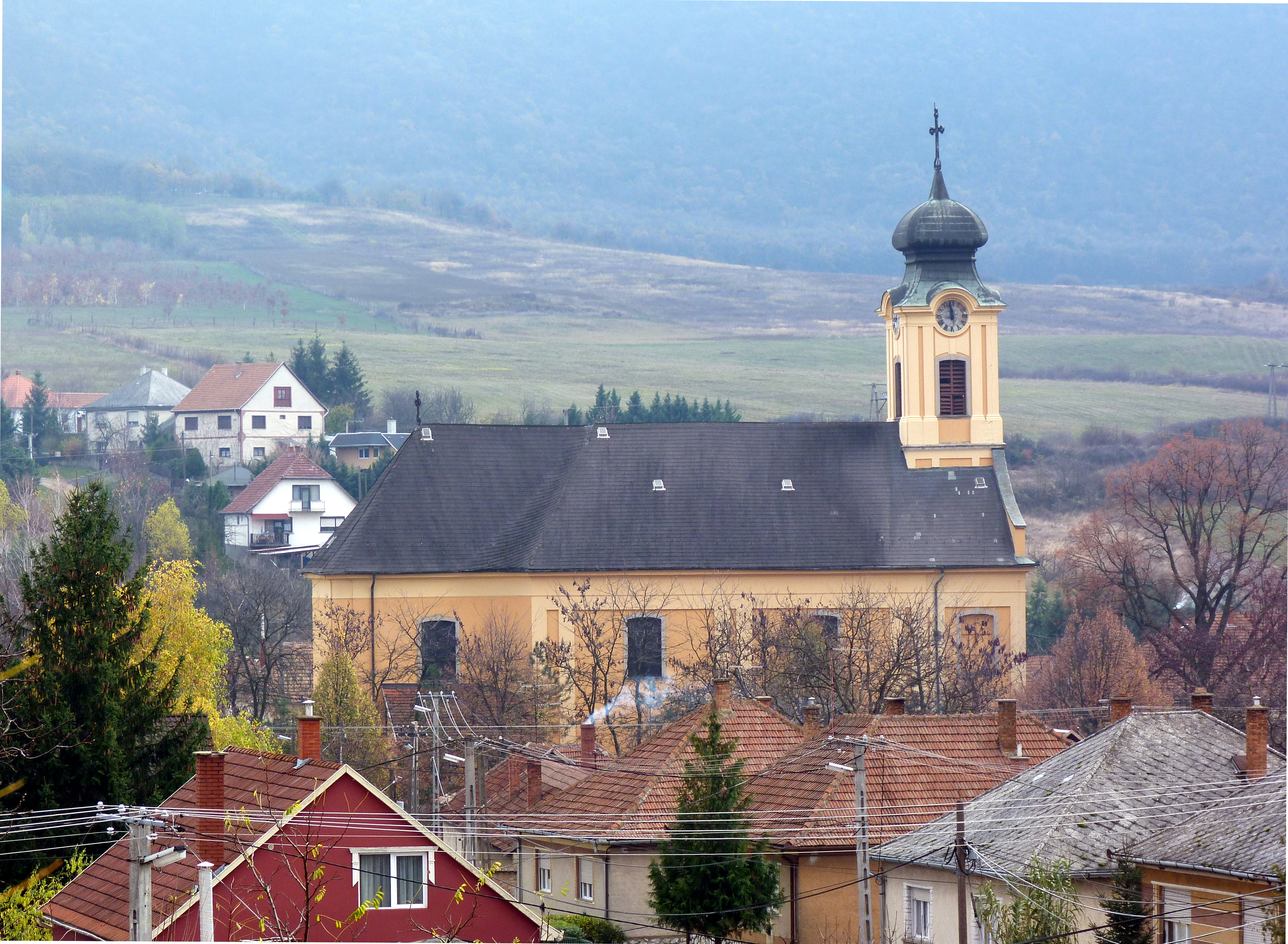 A felvétel 2013. november 20 -án szerdán készült Felsőtárkányban. ©© Derzsi Elekes Andor, Budapest, 2013, You are authorised to use these photos and vids under Creative Commons – even for commercial, for profit purposes. Photos must be attributed to Derzsi Elekes Andor. All of the photos and vids in the Metapolisz DVD line are under Creative Commons and can be used even for commercial – for profit – purposes. Recommended Citation Derzsi Elekes Andor: Metapolisz DVD line This is a photo of a monument in Hungary, Identifier: 5657